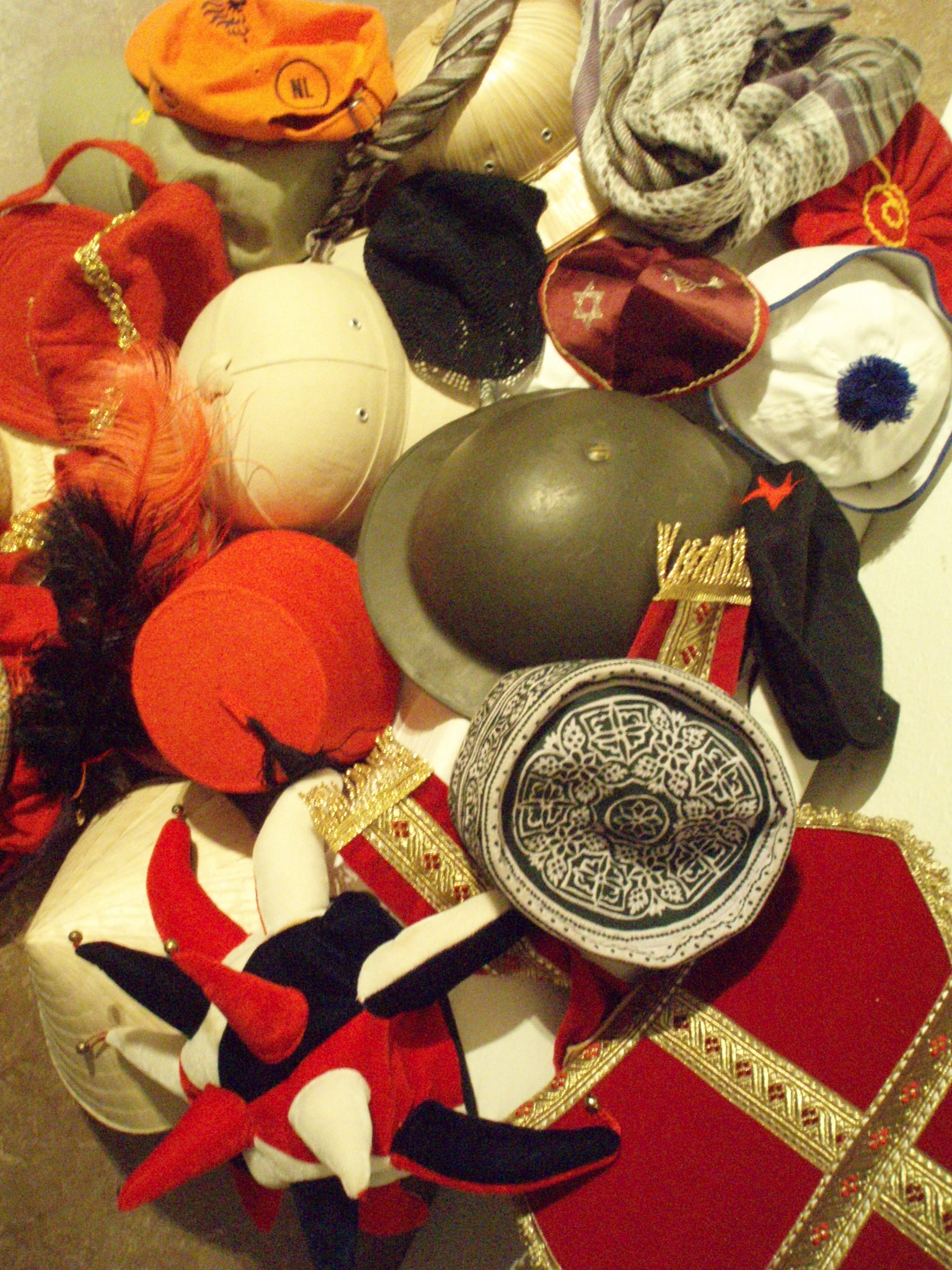 eigen foto 2006 (c) looi